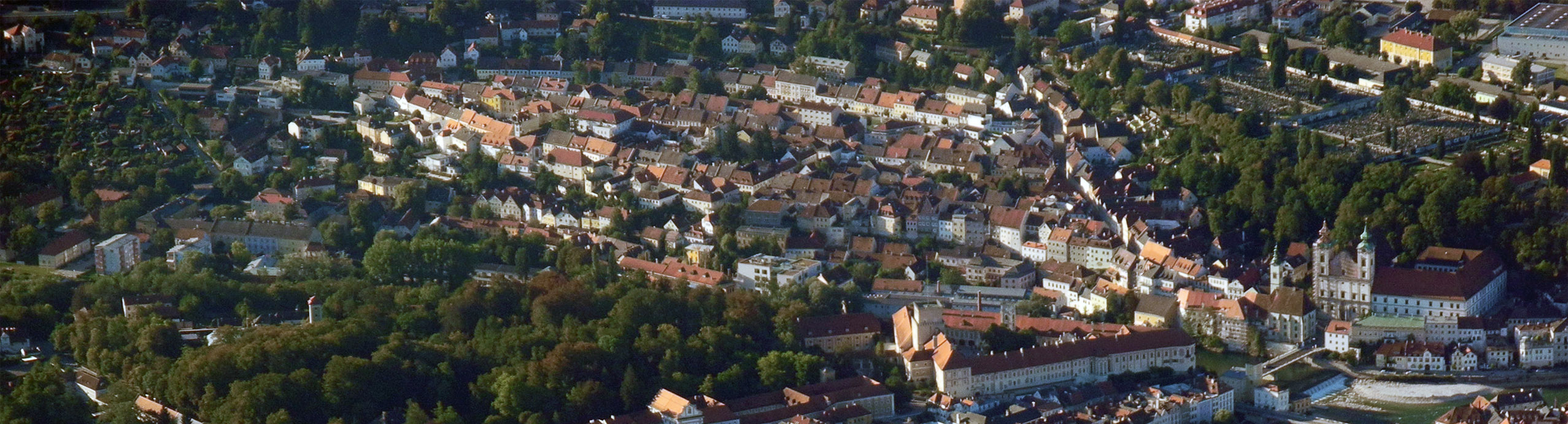 Luftbild des Steyrer Stadtteils Steyrdorf